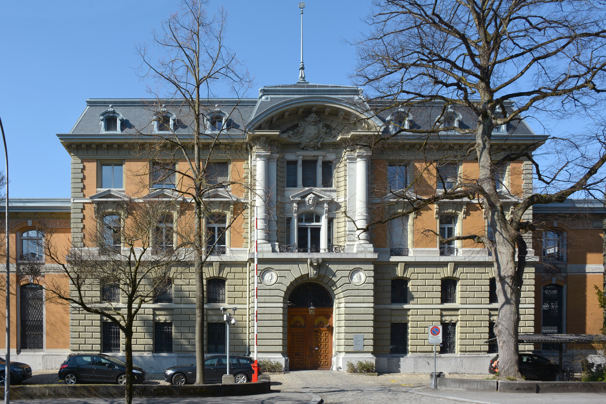 Hauptfassade der Eidgenössischen Münzstätte Swissmint in Bern (2016)